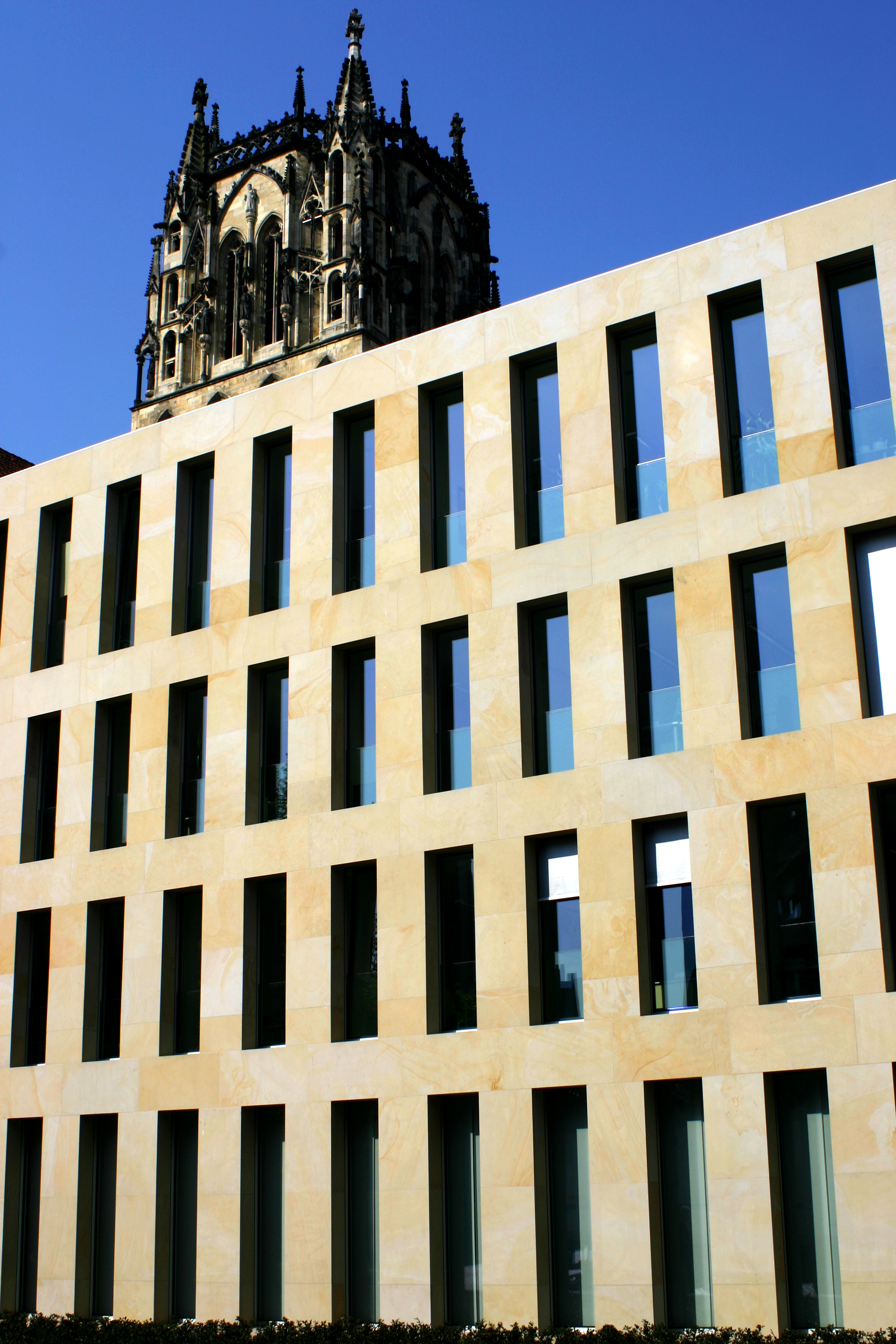 Gebäude der Diözesanbibliothek in Münster, Im Hintergrund die Turmspitze der Überwasserkirche